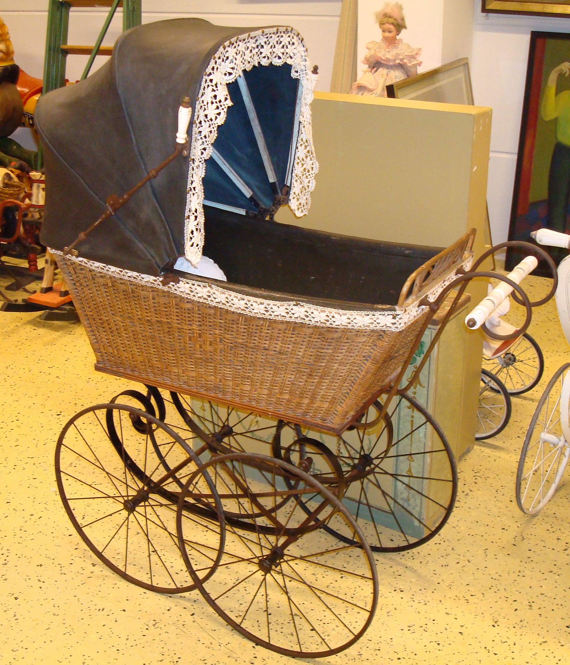 Kinderwagen, historische Form